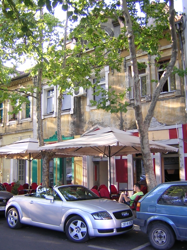 Podgorica